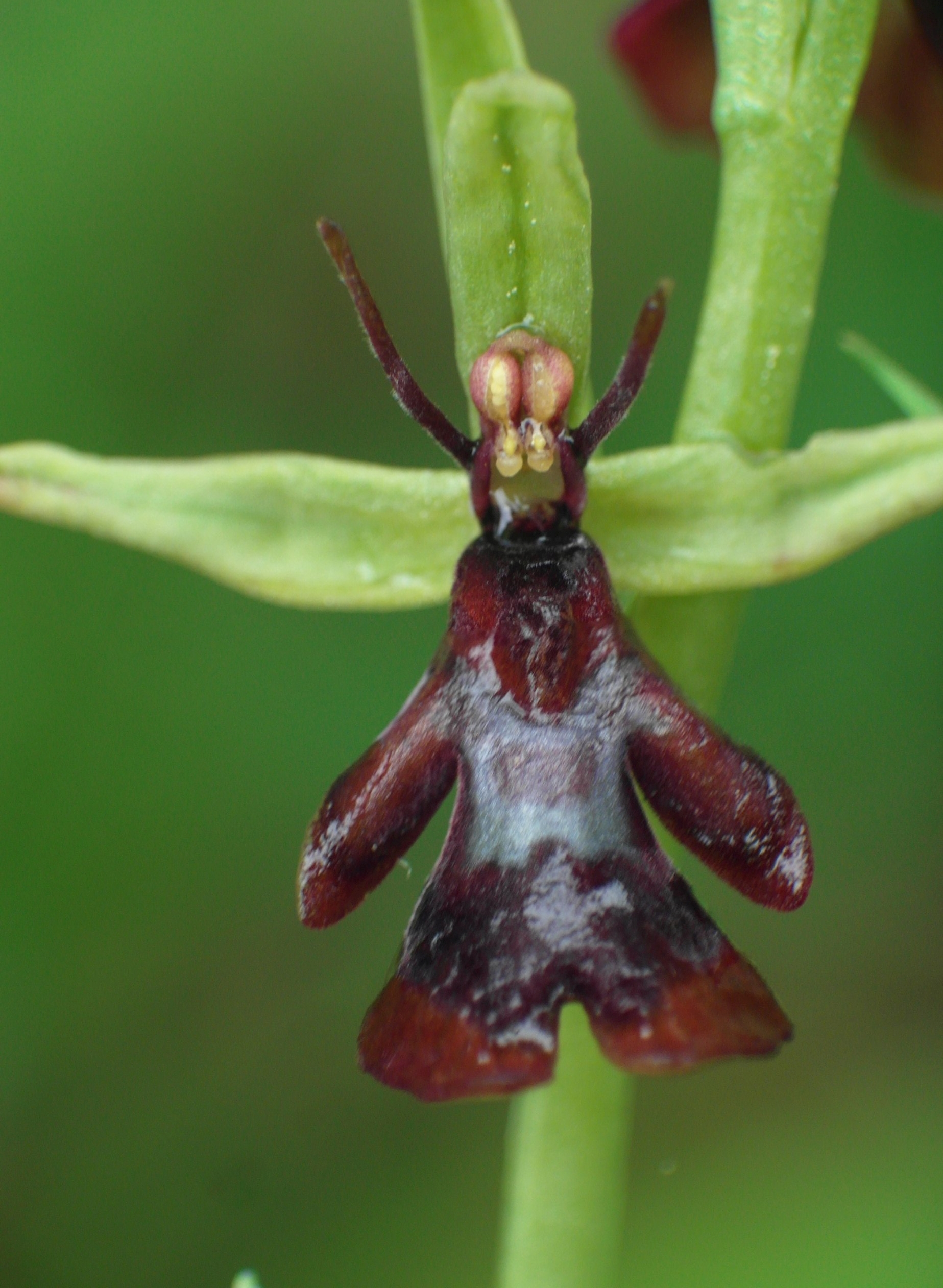 Fliegen-Ragwurz (Ophrys insectifera) am Blassenberg (Großkochberg) mit gut sichtbaren Pollinien